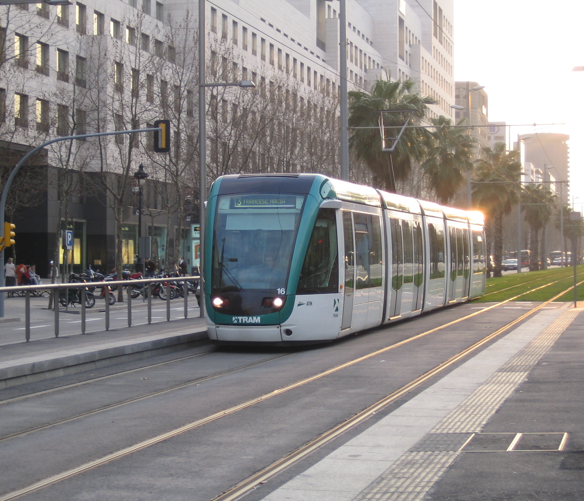 Foto hecha por mi desde la estación de L´Illa de la línea T1 T2 T3, el viernes 24 de Febrero del 2006 a las 17:55 de la tarde. Con la cámara CANON ixus 40